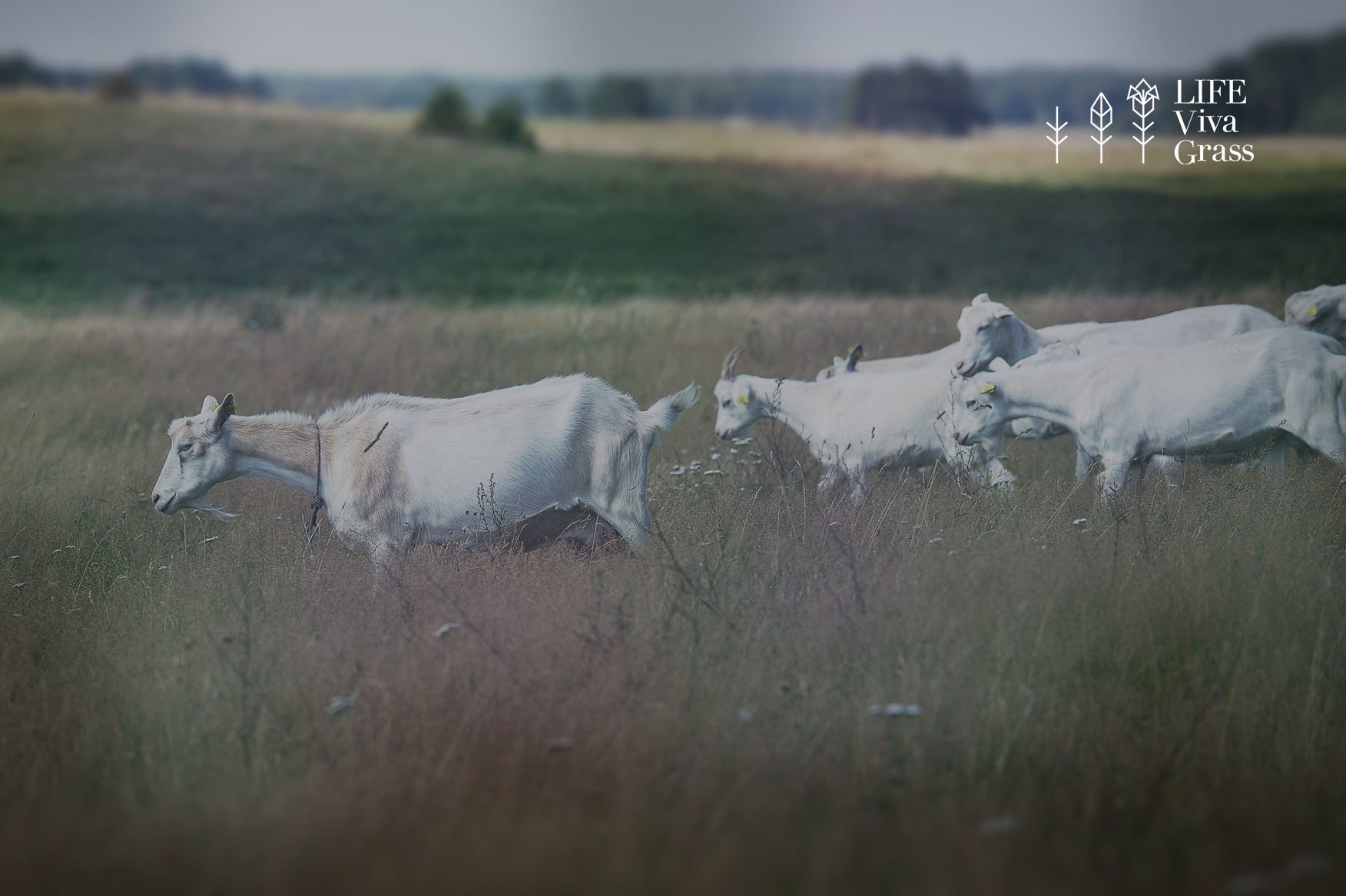 Vinea iš pievos mums teikiamų ekosisteminų paslaugų - pašaras gyvūliams